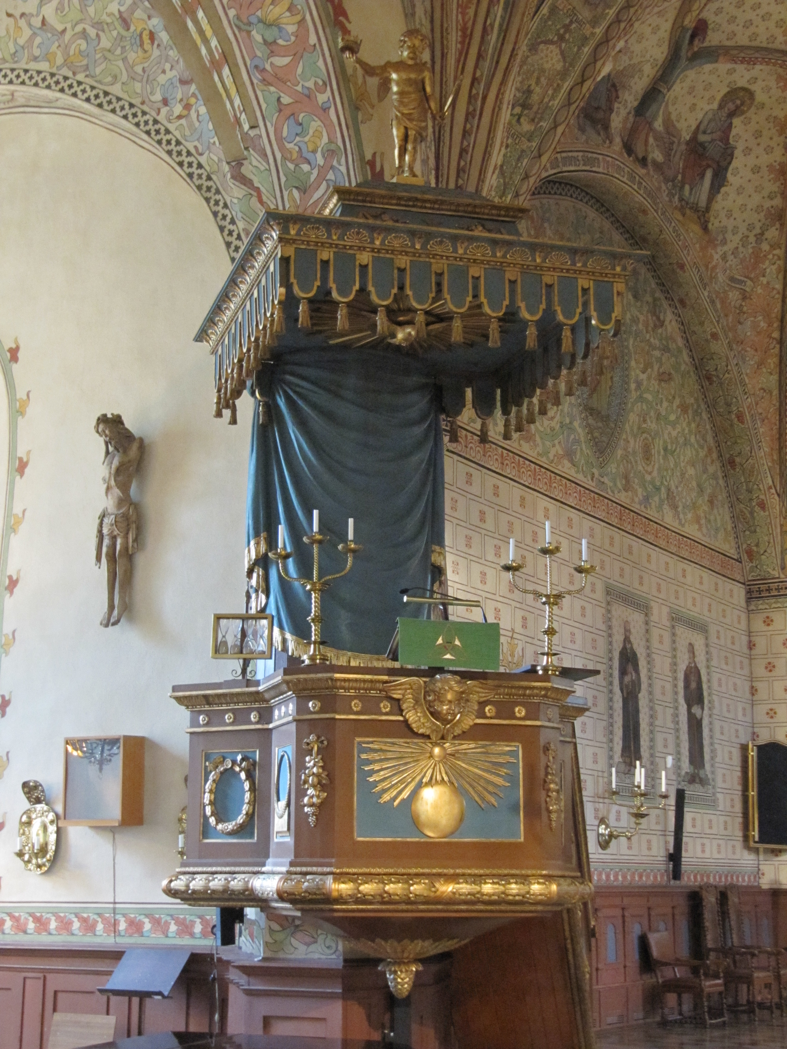 Predikstol i Vårfrukyrkan